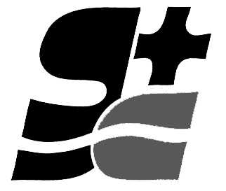 Logotipo oficial del Movimiento de Seglares Claretianos